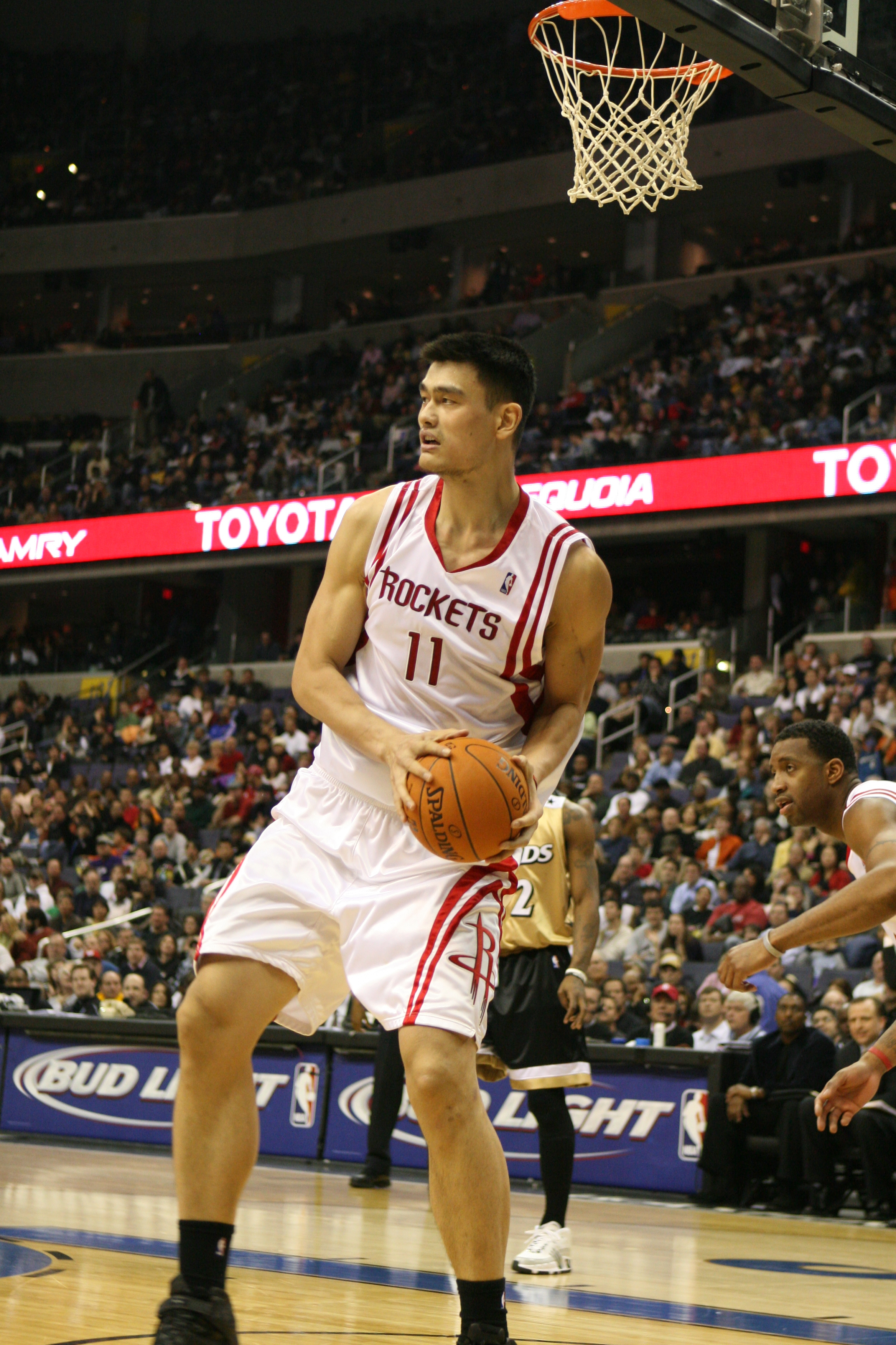 Yao Ming